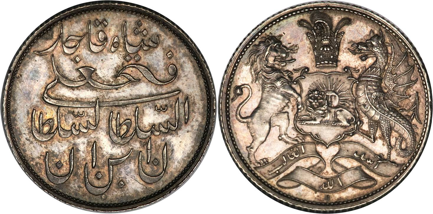 مدال نقره فتحعلی شاه قاجار ضرب انگلستان سال ۱۸۳۰